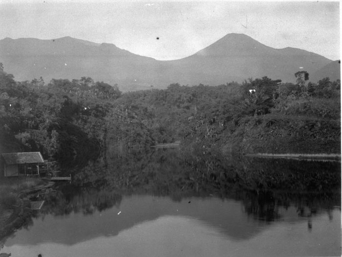 Foto. Het meer van Tjisaroea ten westen van Sindanglaja aan de voet van de hellingen van de vulkaan Gedeh en Pangrango op West Java